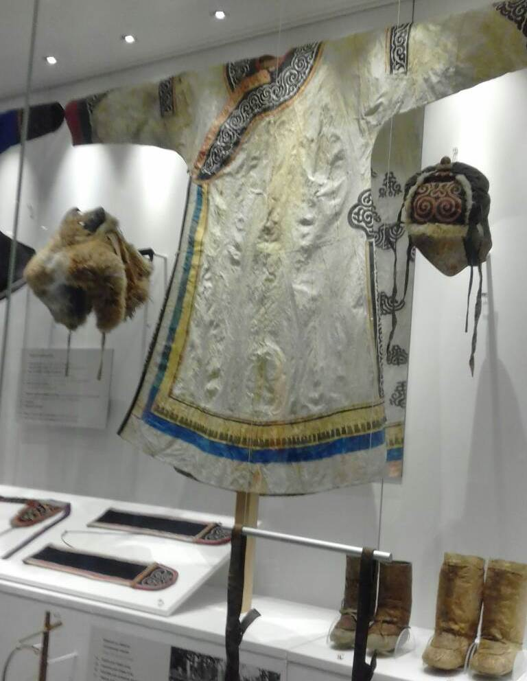 Экспозиция музея. Национальная одежда коренных народов Сахалина